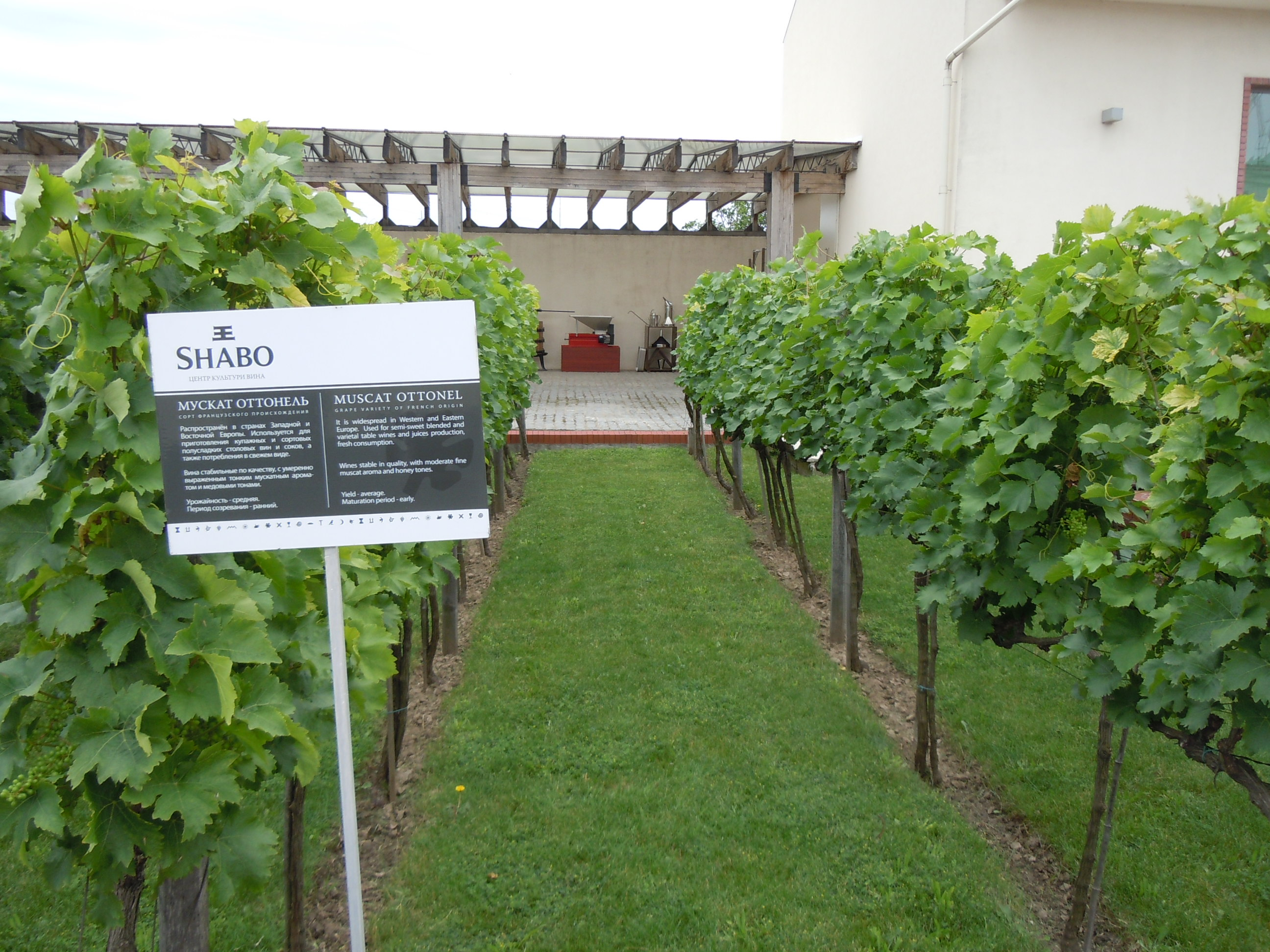 Виноградники при Центру культури вина в Шабо